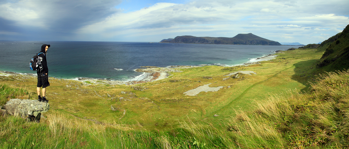 Molnes naturreservat sett frå vest